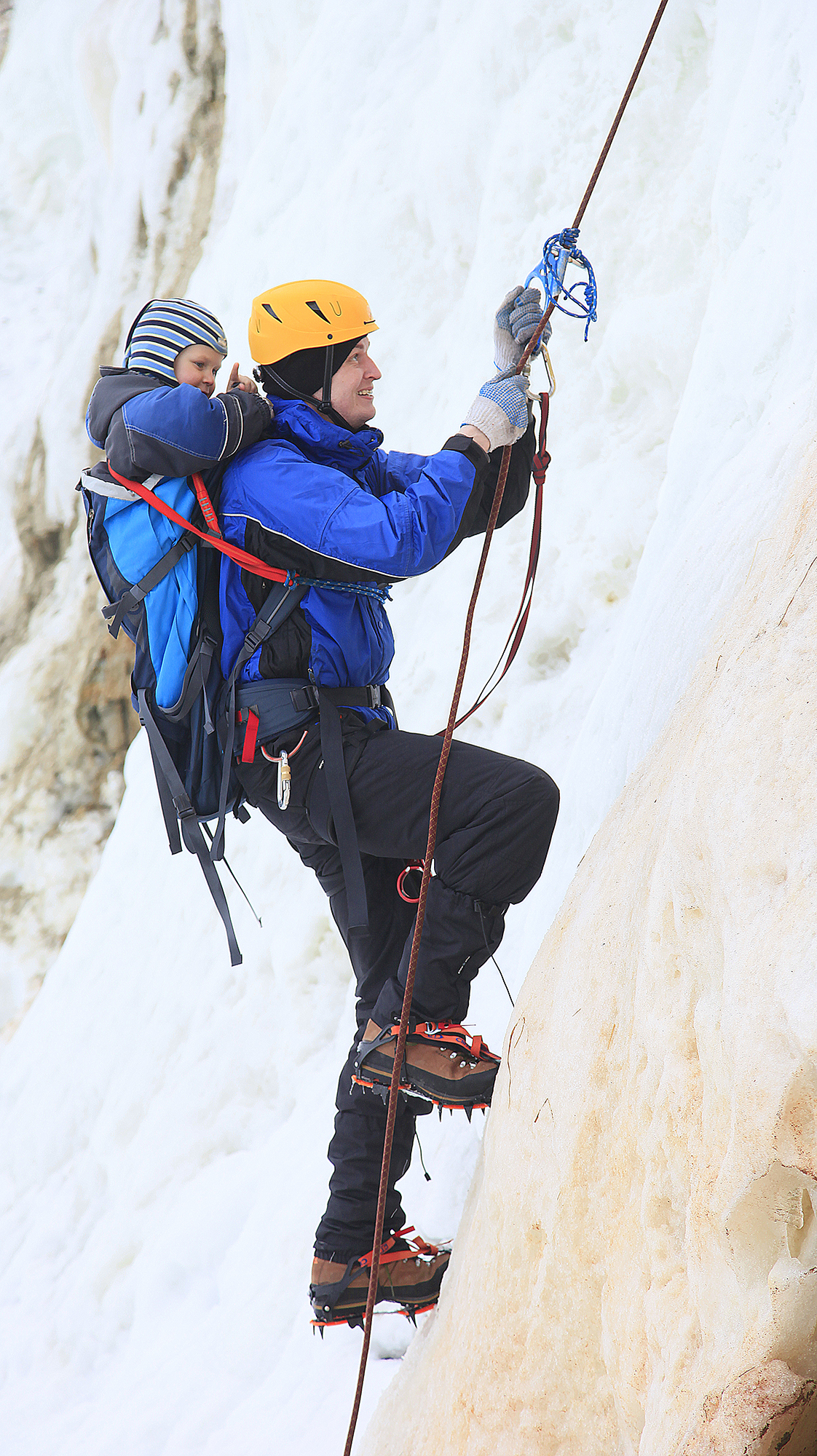 Uko Nõulik